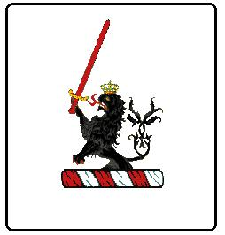 Een fantasiewapen om de typisch Engelse heraldische stijl te illustreren. Alleen daar wordt een helmteken zo op een wrong geplaatst. In andere landen is dit niet gebruikelijk. Wanneer men een dergelijk helmteken op een wapen, of op zilver gegraveerd ziet heeft men dus met een Engels familiewapen van doen. Eigen tekening, Robert Prummel.